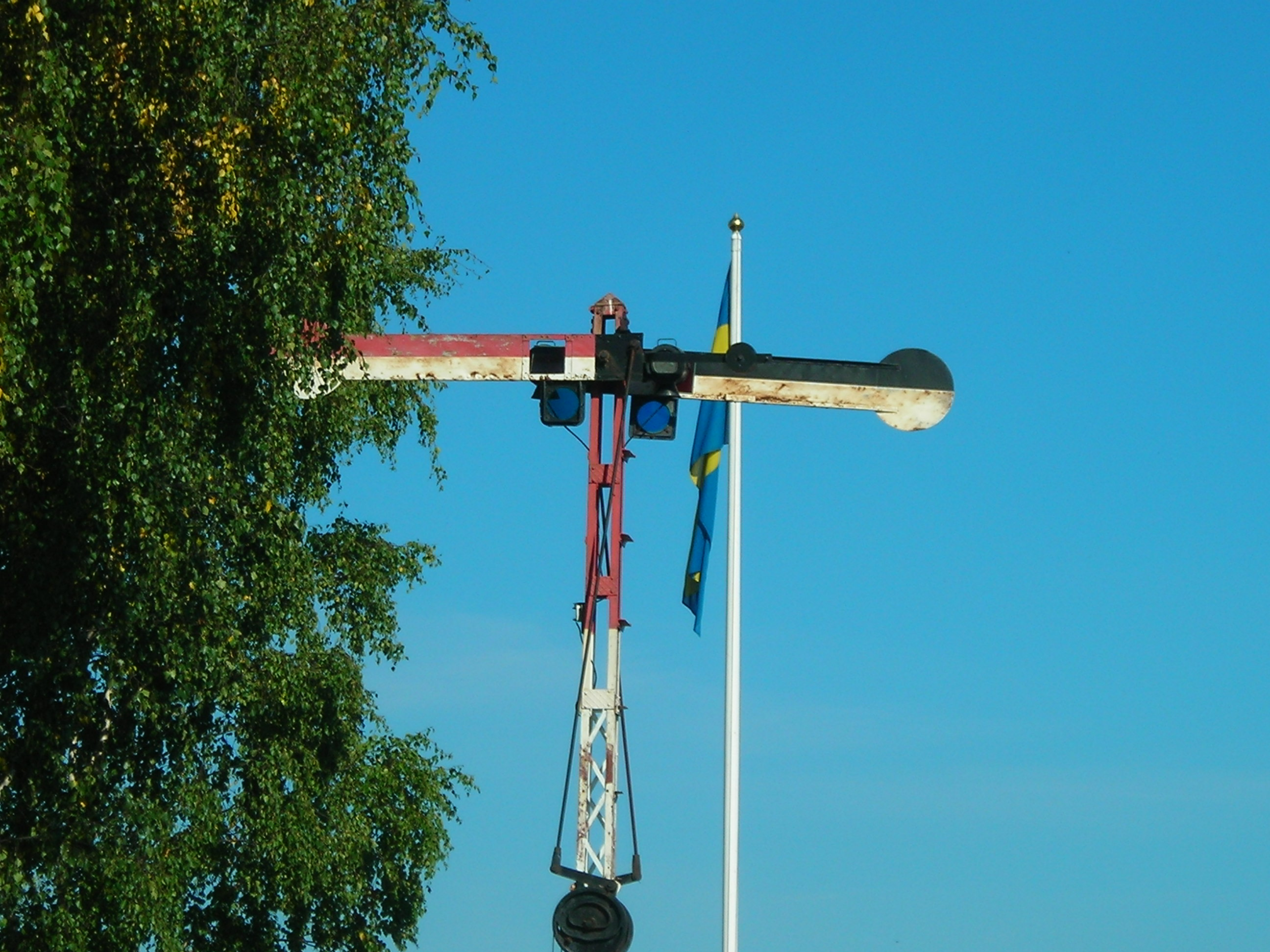 Semaforen i Marielund.